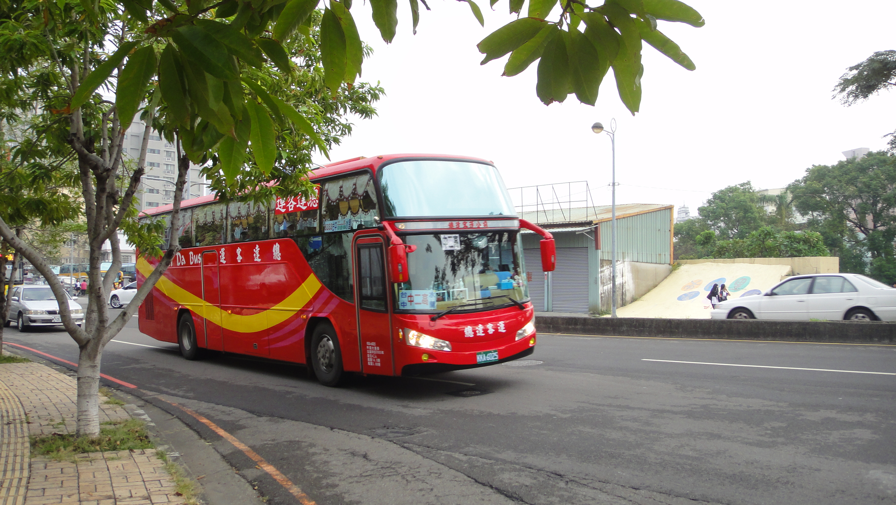 總達客運大客車KKA-6025